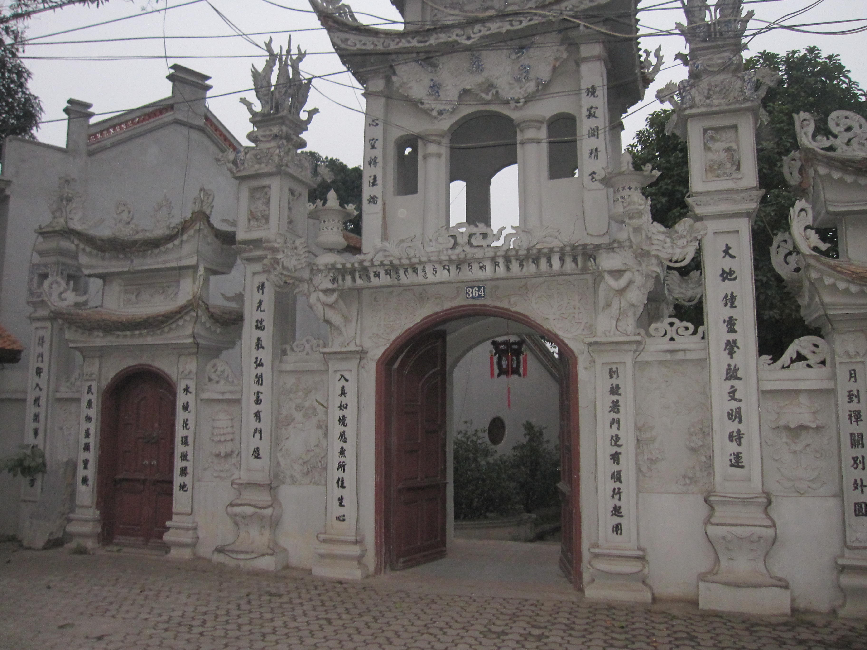 Cổng chùa Vạn Niên - 364 Lạc Long Quân